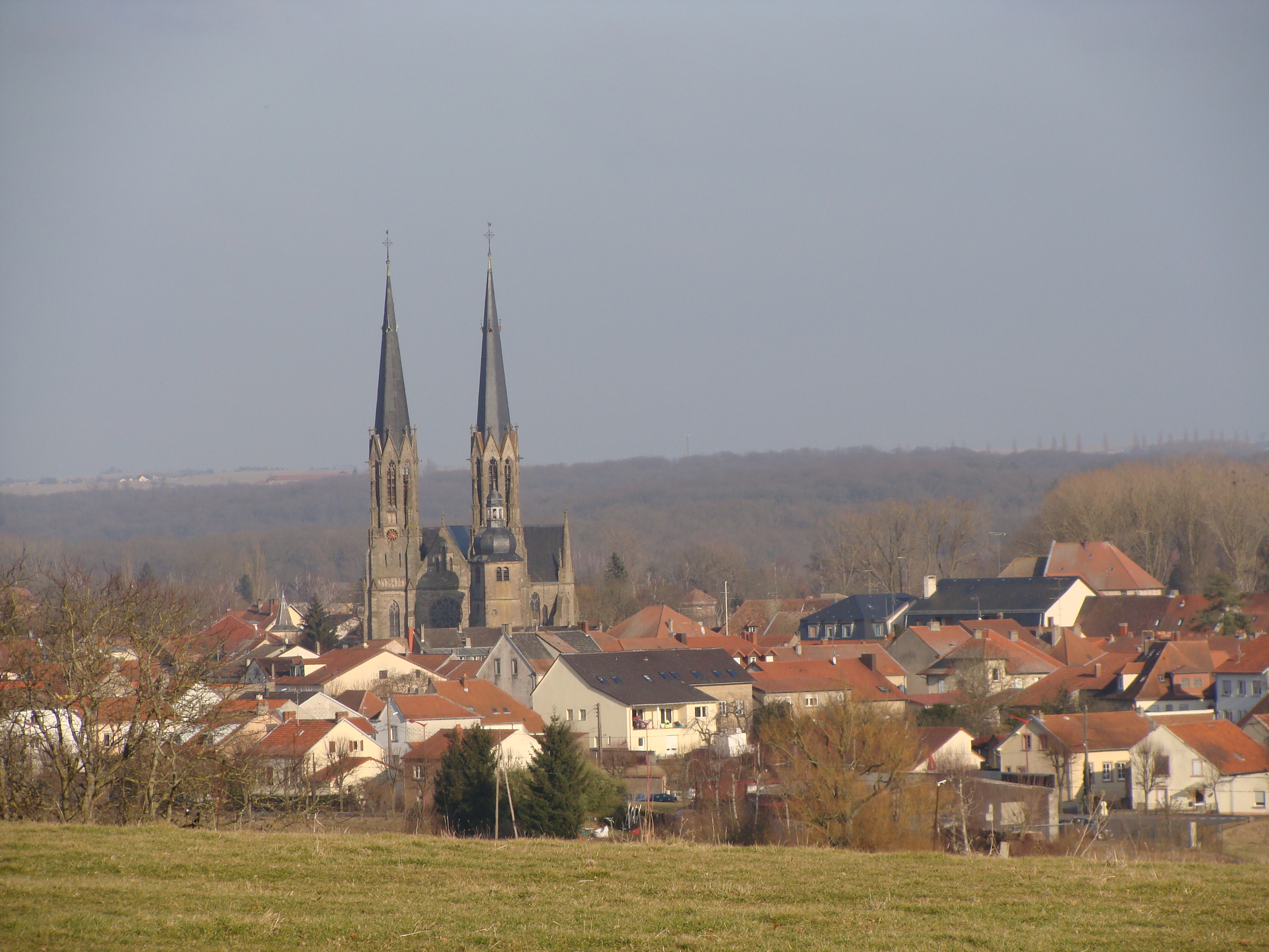 Sarralbe (Moselle), vue de la ville et de l'église Saint-Martin.